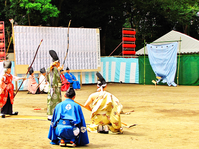 歩射神事の様子